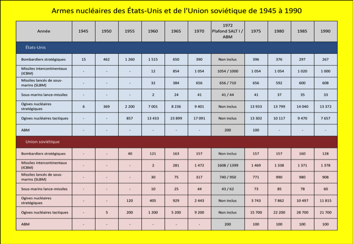 Tableau de données relatives aux armes nucléaires stratégiques détenues par les États-Unis et l'Union soviétique de 1945 à 1990, les chiffres correspondant à la fin de l'année en cours. Ce tableau indique aussi les limites fixées par le traité SALT I. Les données proviennent des tableaux détaillés figurant sur les sites FAS et NRDC.